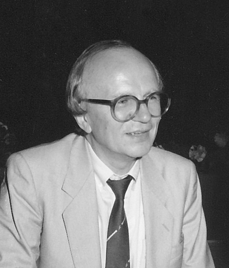 Friedrich Nowottny, deutscher Journalist bei einer Veranstaltung 1985 in Rheinbach.